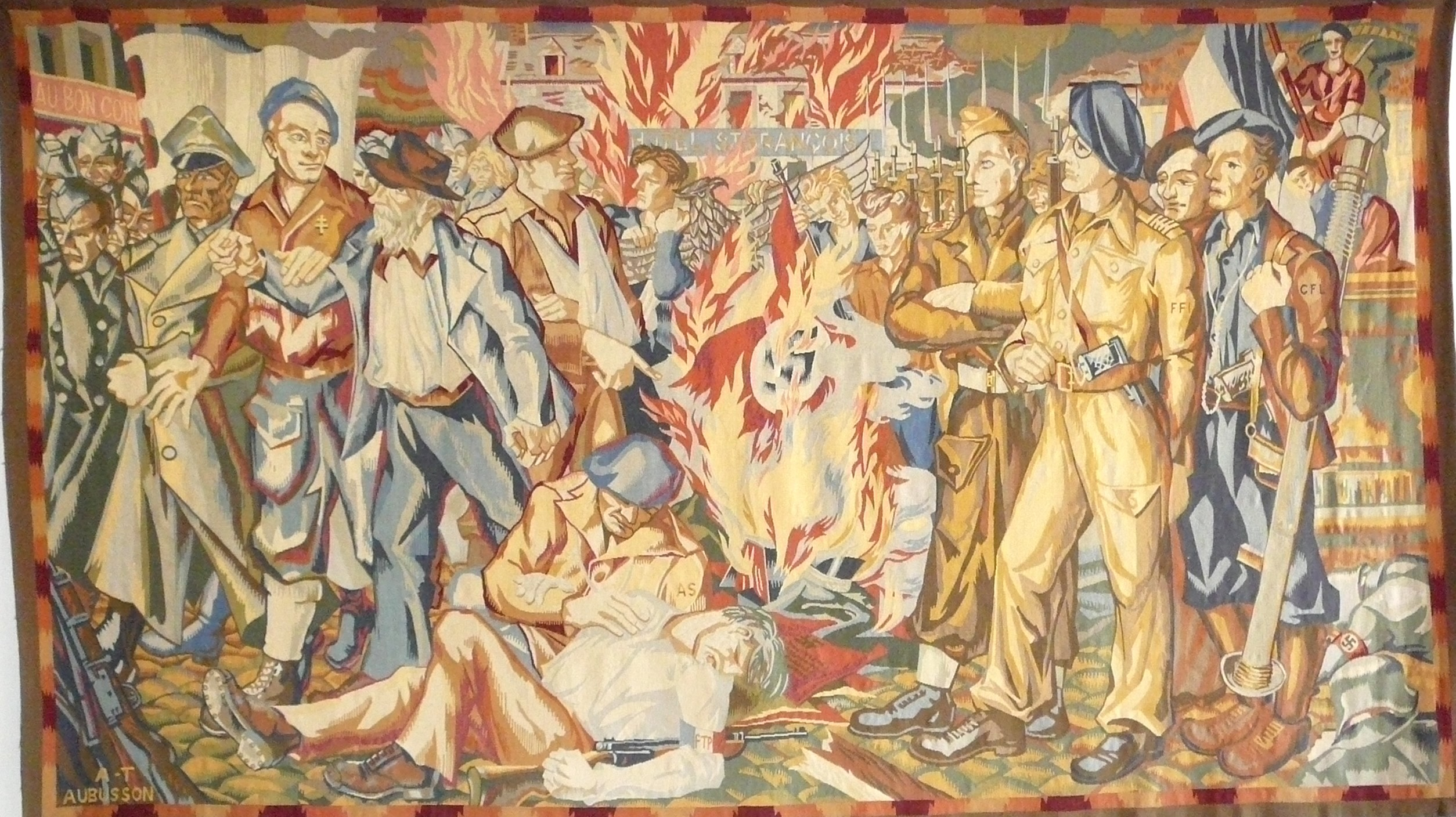 Tapisserie d'Aubusson figurant la libération de Guéret du 7 juin 1944